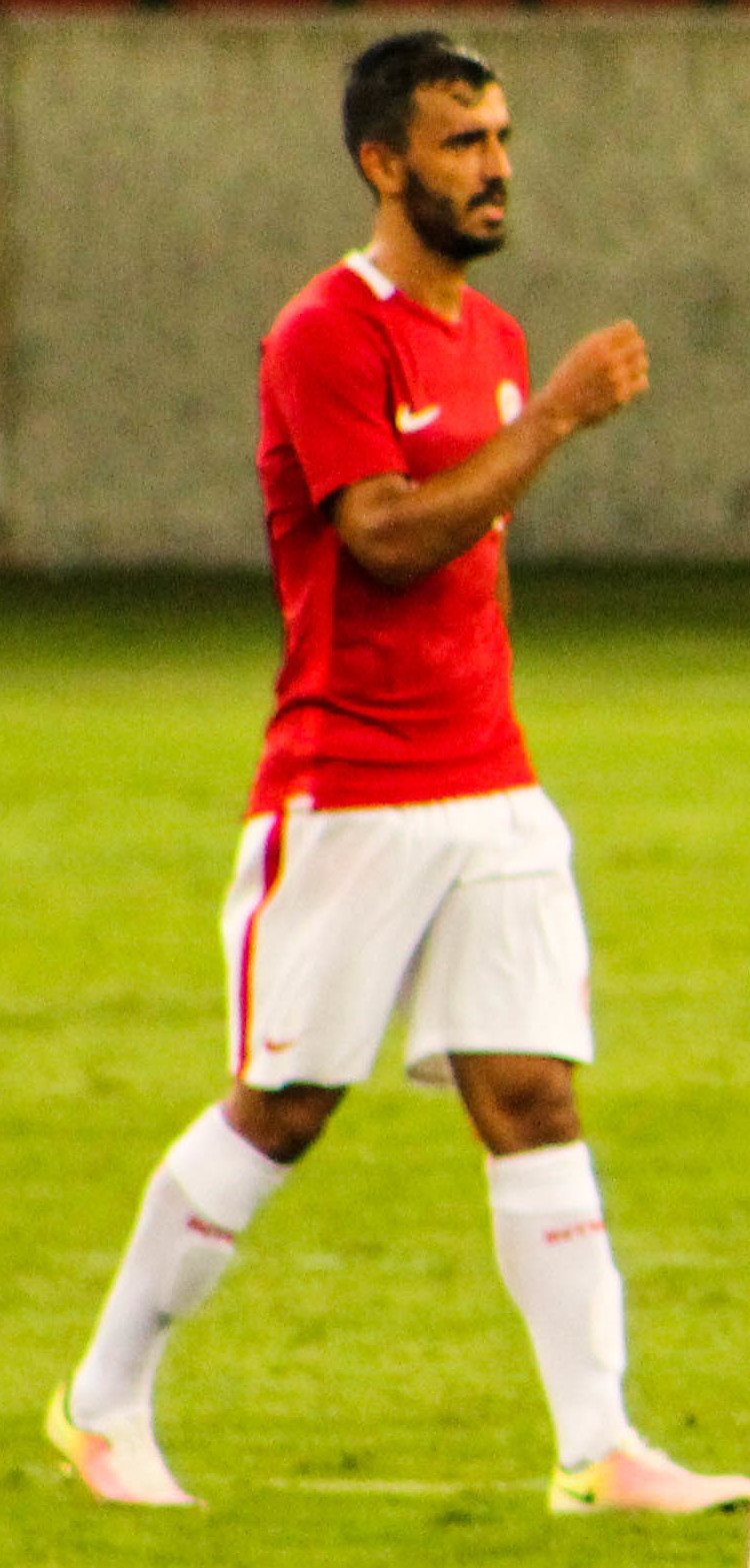 Uendel pelo Inter em 2017